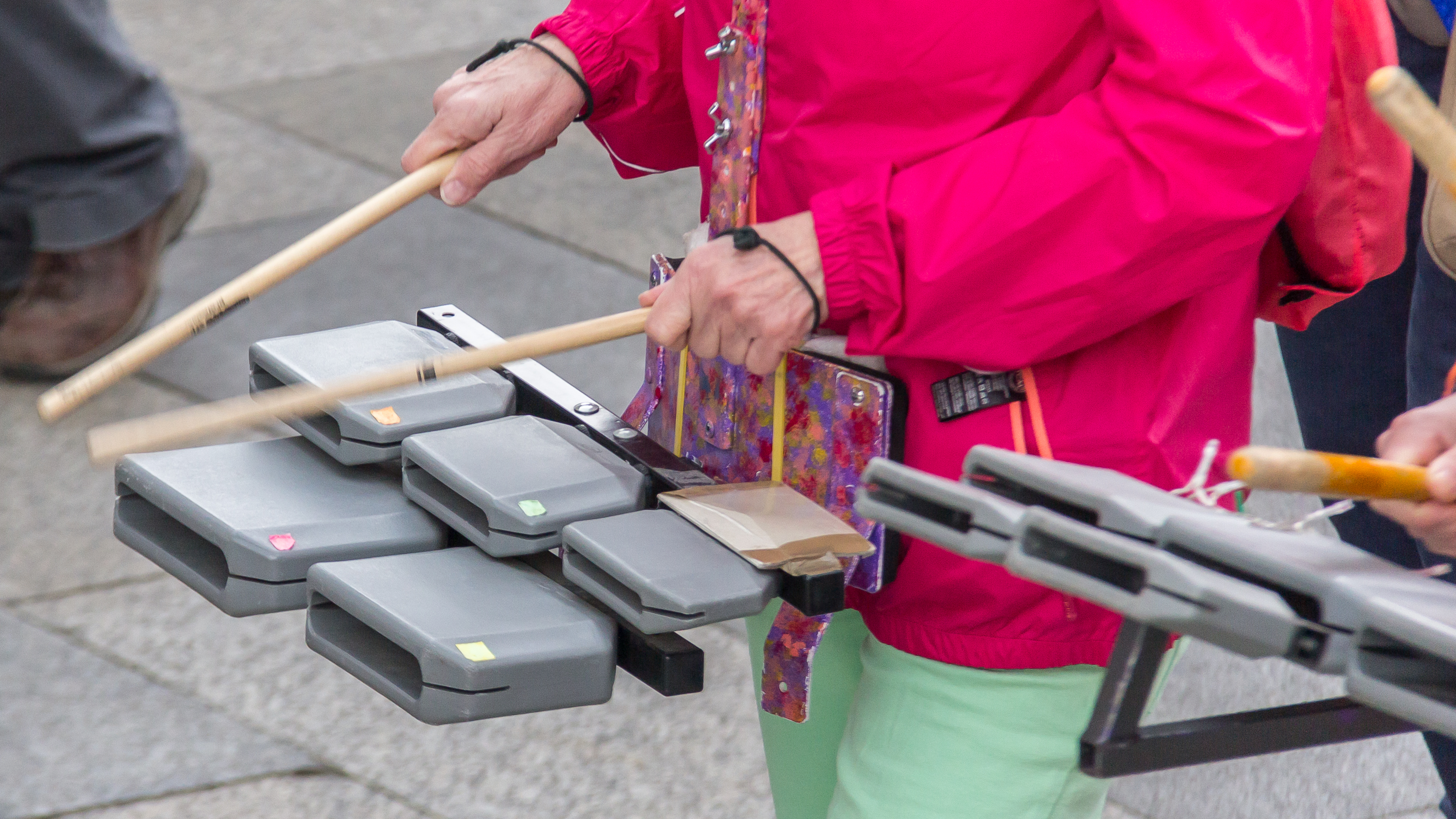 Auftaktveranstaltung zur Frühjahrskampagne der Stiftung Stadtgedächtnis „Kölner retten ihr Stadtgedächtnis“ Foto: Das Kunstorchester Kwaggawerk zieht über die Domplatte zum Roncalliplatz. Detail: Granite Blocks